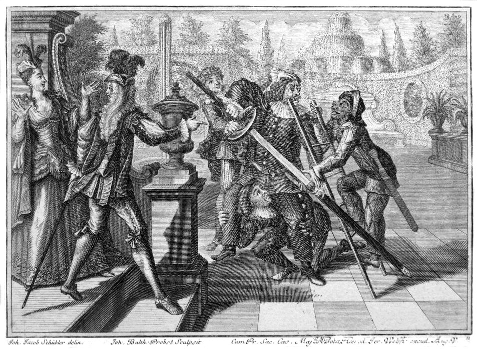 Comedie italienne (Arlequin, Scaramouche, Capitan, Mezzetin)